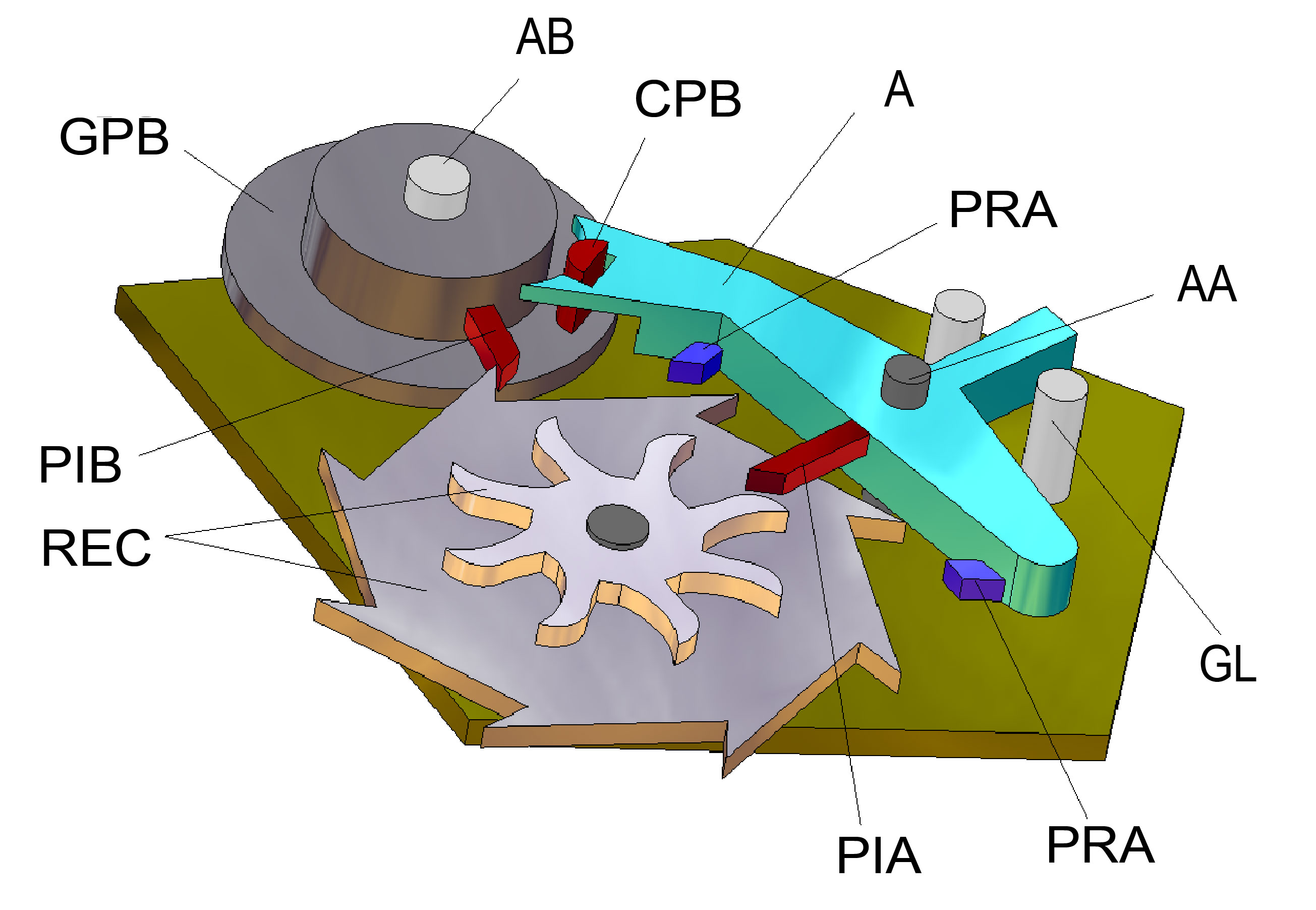 Echappement co-axial